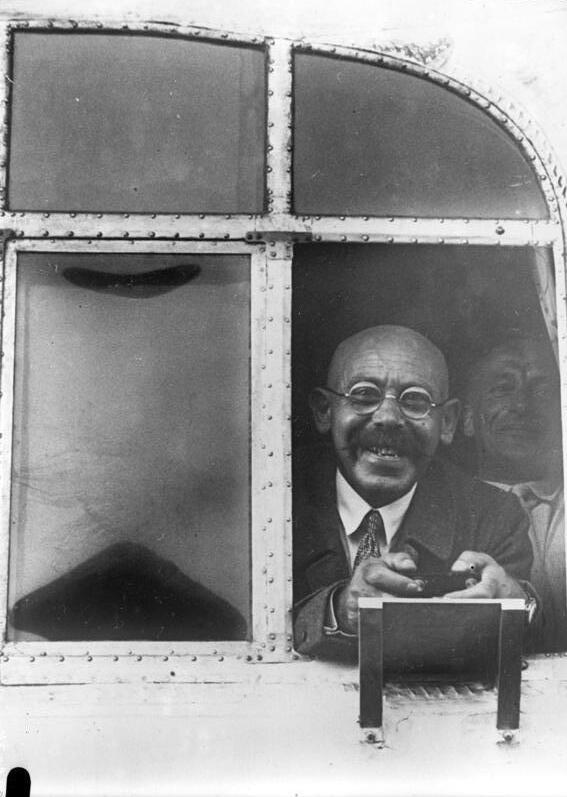 "Graf Zeppelin" auf seiner Eismeerfahrt! Der wissenschaftliche Leiter der Arktis-Expedition der "Graf Zeppelin", der russische Prof. Samoilowitsch am Kabinenfenster des "Graf Zeppelin", kurz vor der Landung.